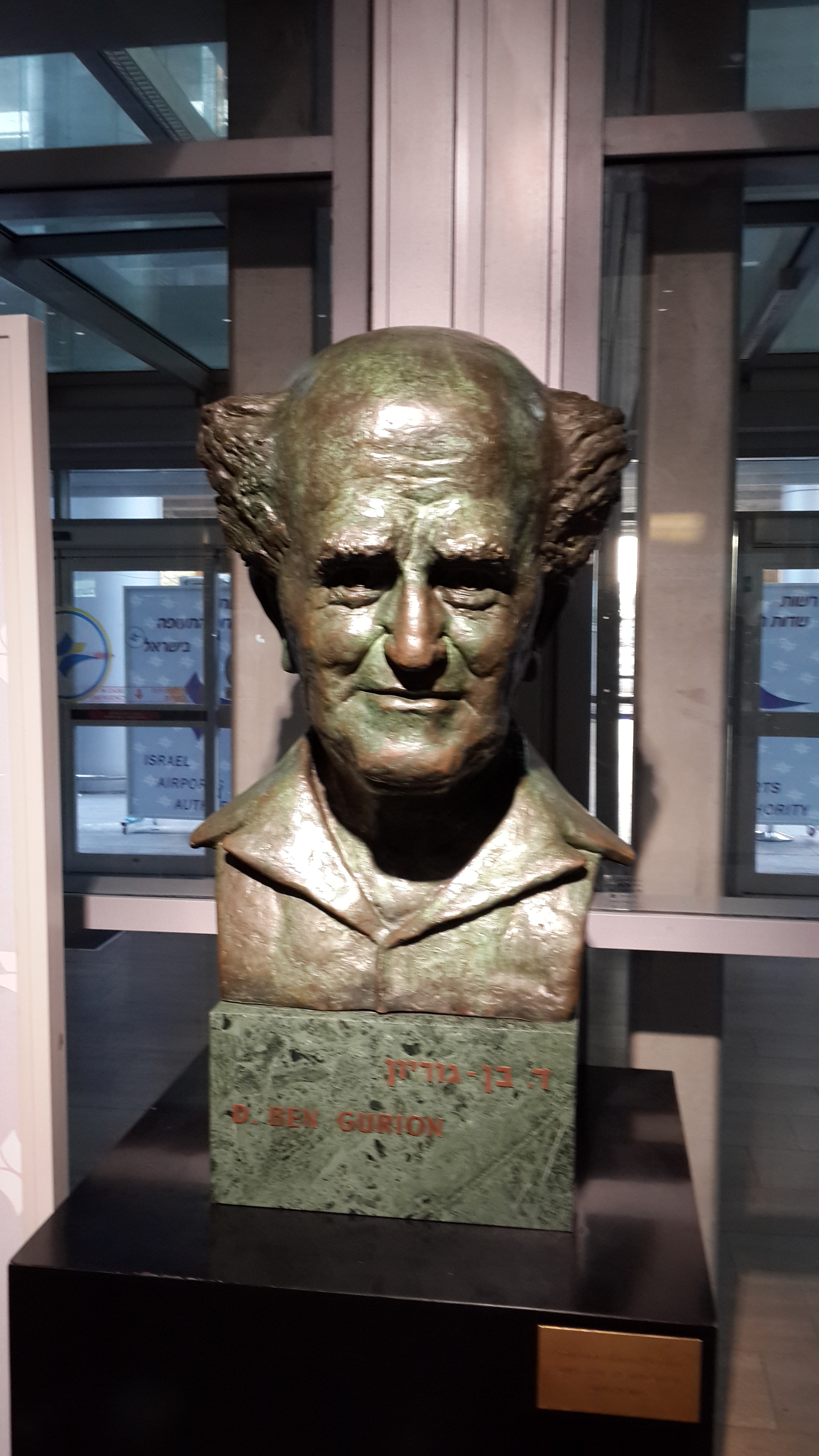 Бюст Бен-Гуриона в аэорпорту Бен-Гуриона